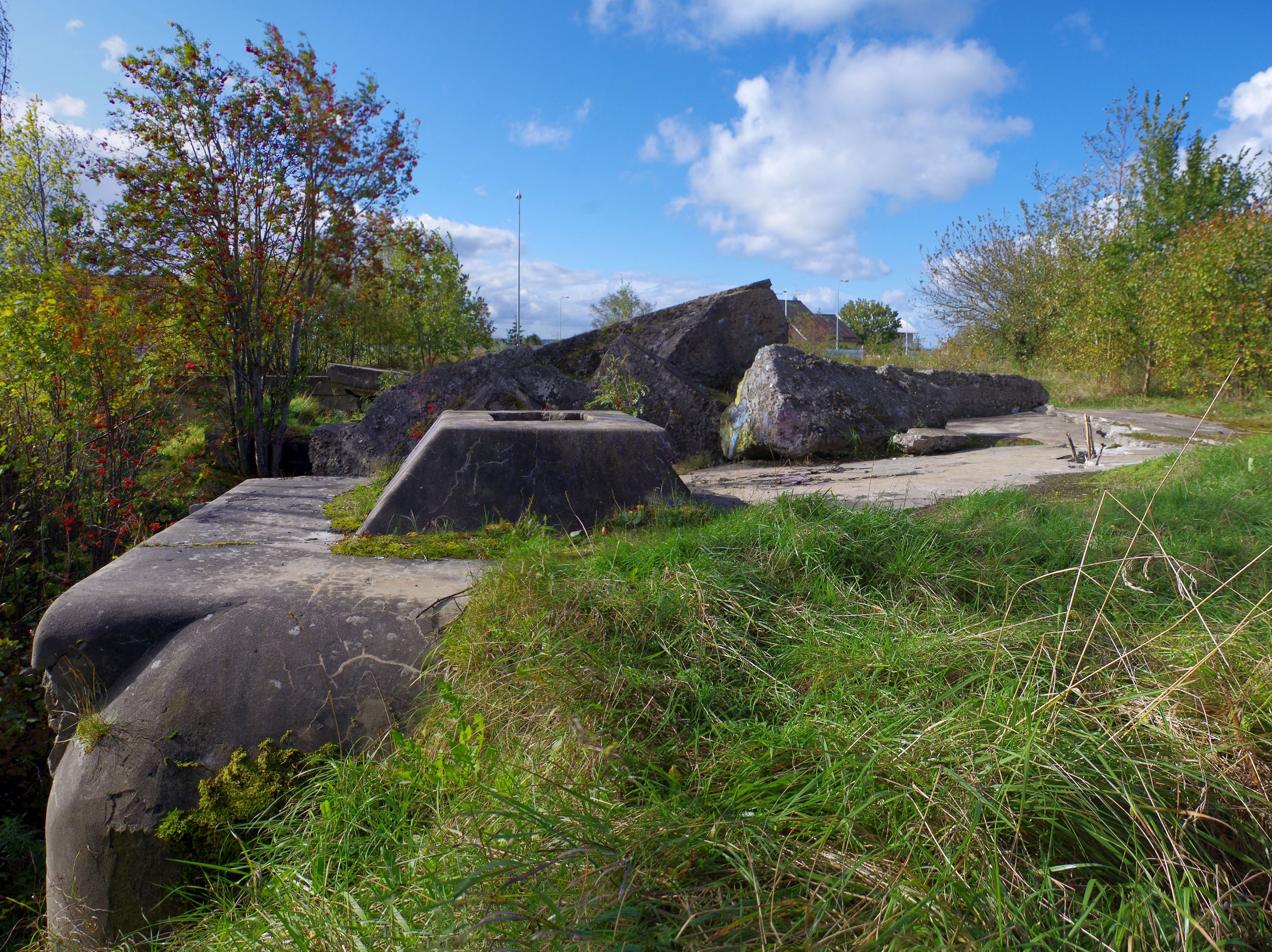 Peeter Suure merekindluse rannakaitsepatarei nr. 13, 1915. a.